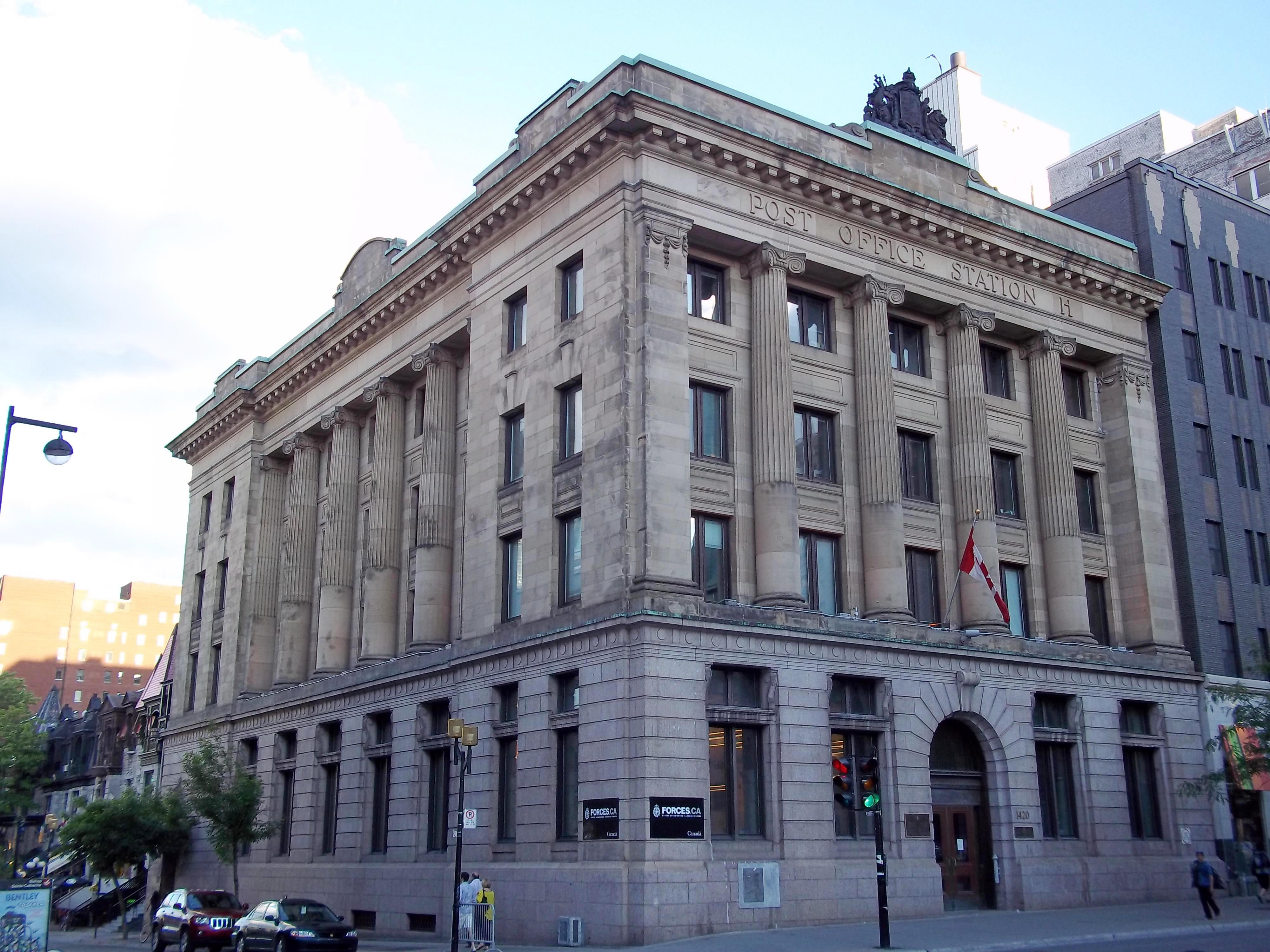 Succursale postale H, rue Sainte-Catherine ouest, Montréal